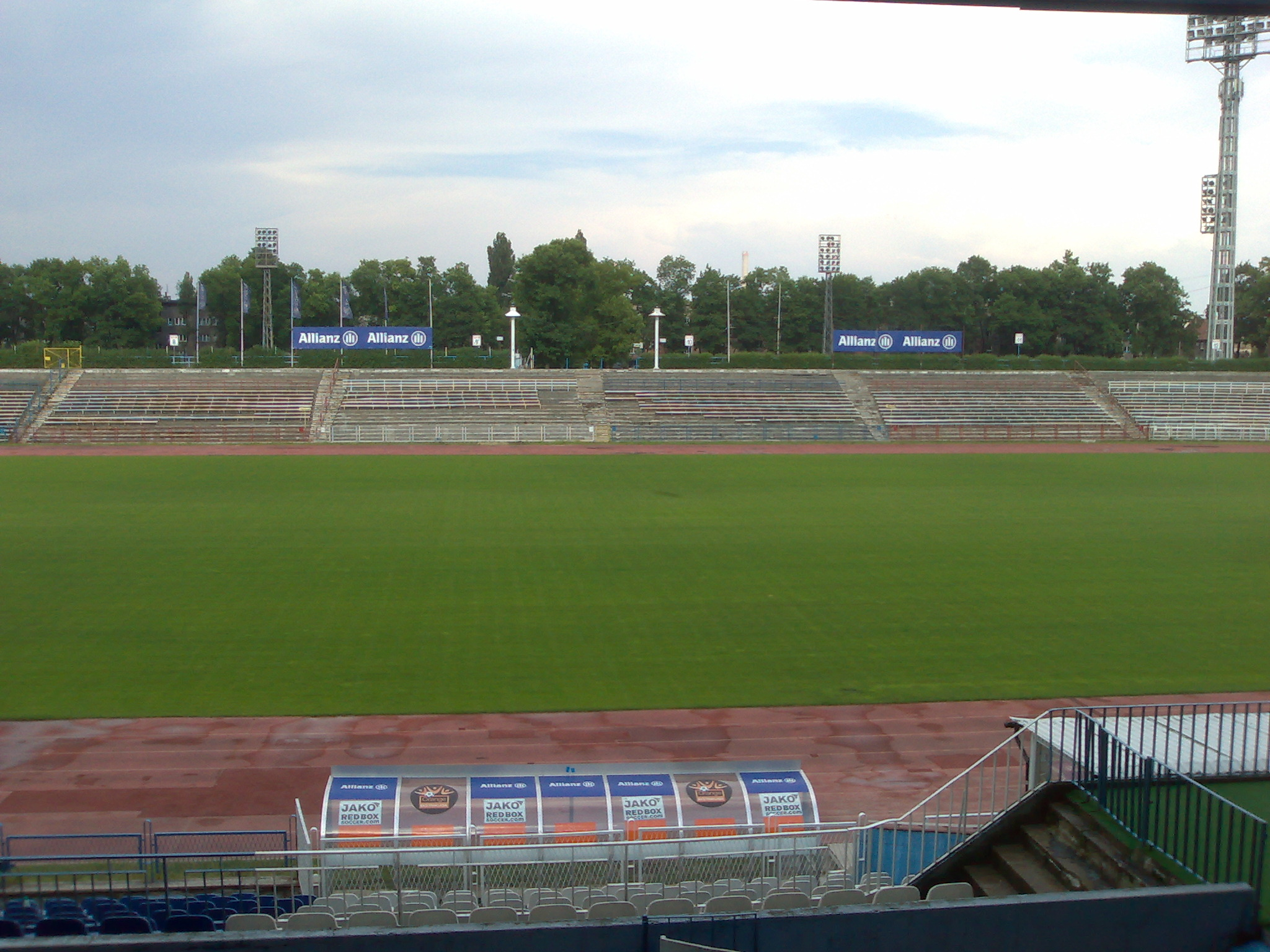 Stadion im. Ernesta Pohla w Zabrzu